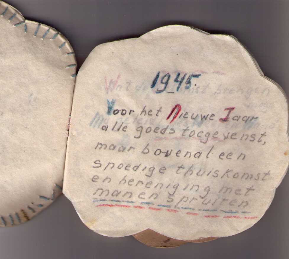 Souvenir van mevrouw van Ommen, lid van het Agfacommando van Dachau, pagina 1